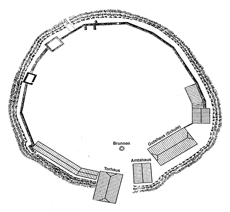 Plan der Burg Wredenhagen